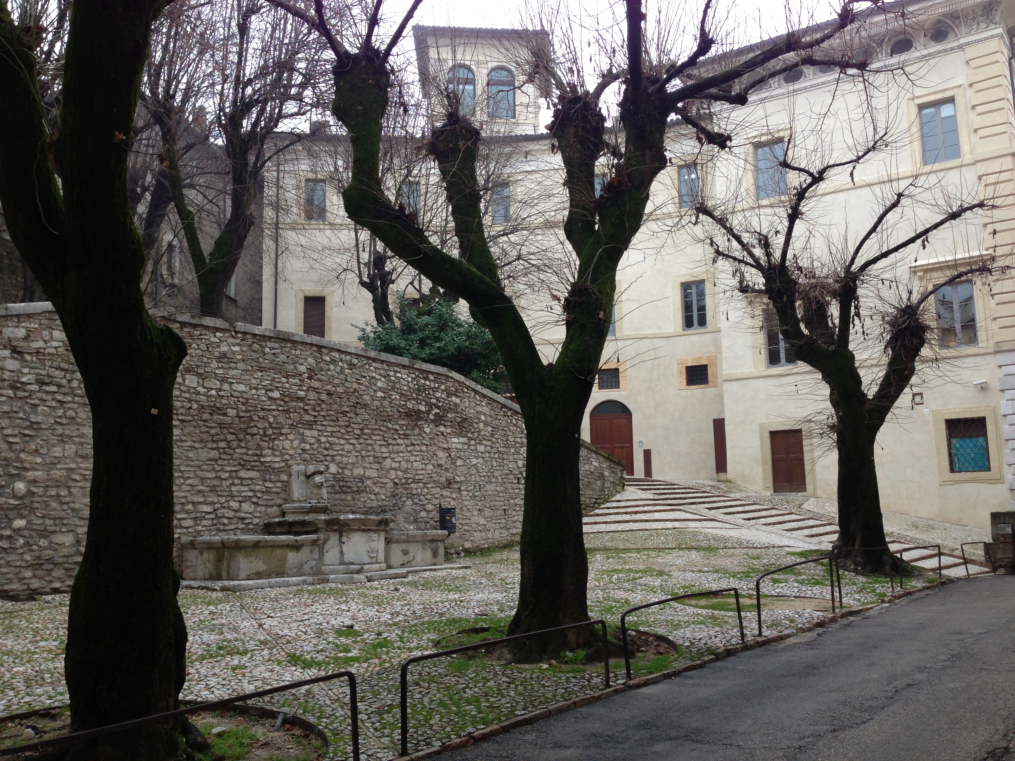 Largo Muzio Clementi con fontana cinquecentesca. Spoleto